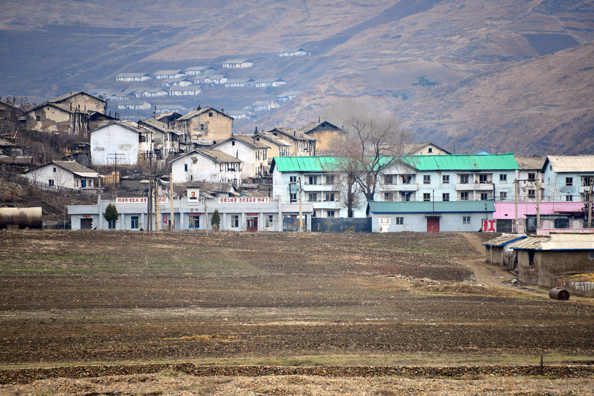 Ji Qing Xian, Jian Shi, Tonghua Shi, Jilin Sheng, China